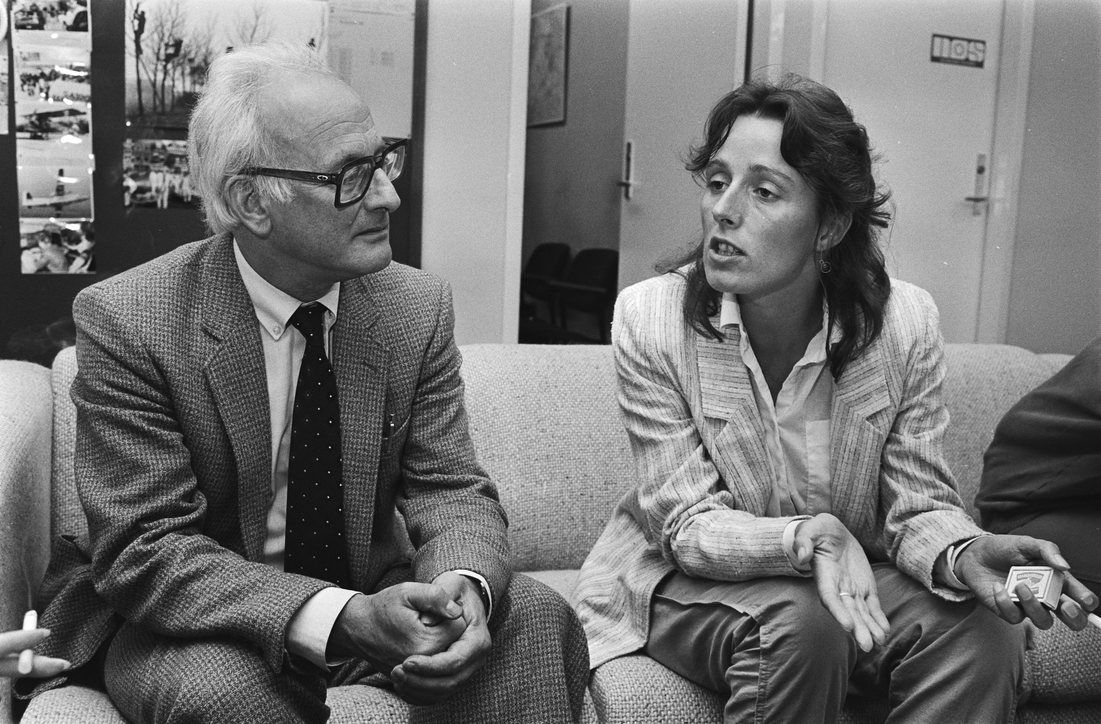 Collectie / Archief : Fotocollectie Anefo Reportage / Serie : CPN-leden Ina Brouwer en Jaap Wolff terug uit Moskou Beschrijving : Mw. Ina Brouwer (r) en dhr. Jaap Wolff op een persconferentie Datum : 30 augustus 1983 Trefwoorden : persconferenties, politici Persoonsnaam : Brouwer, Ina, Wolff, Jaap Instellingsnaam : CPN Fotograaf : Antonisse, Marcel / Anefo Auteursrechthebbende : Nationaal Archief Materiaalsoort : Negatief (zwart/wit) Nummer archiefinventaris : bekijk toegang 2.24.01.05 Bestanddeelnummer : 932-6808